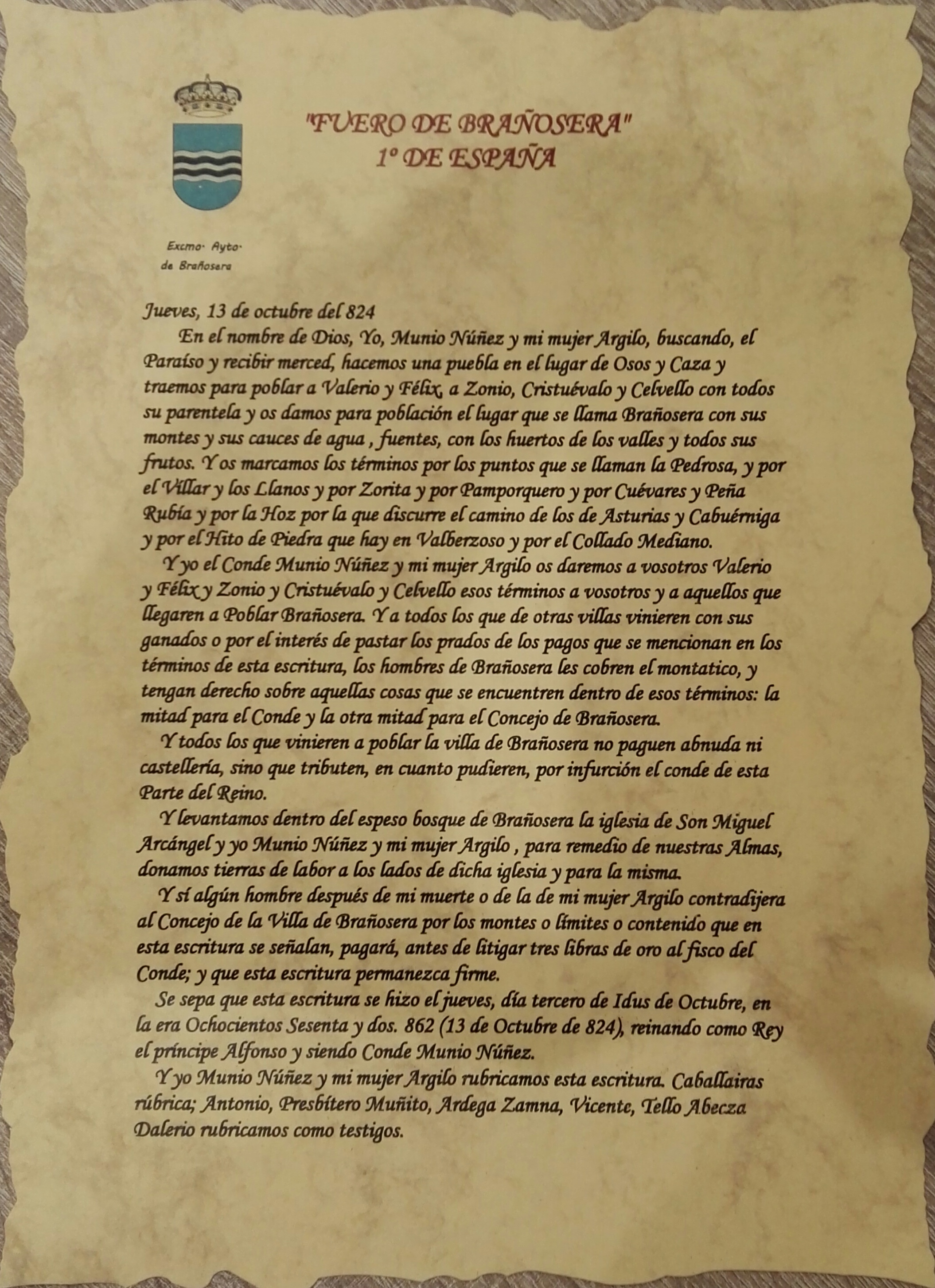 Fuero de Brañosera, primera carta puebla de España.